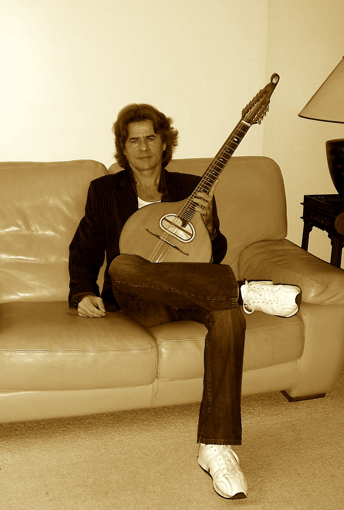 L.JULIARD